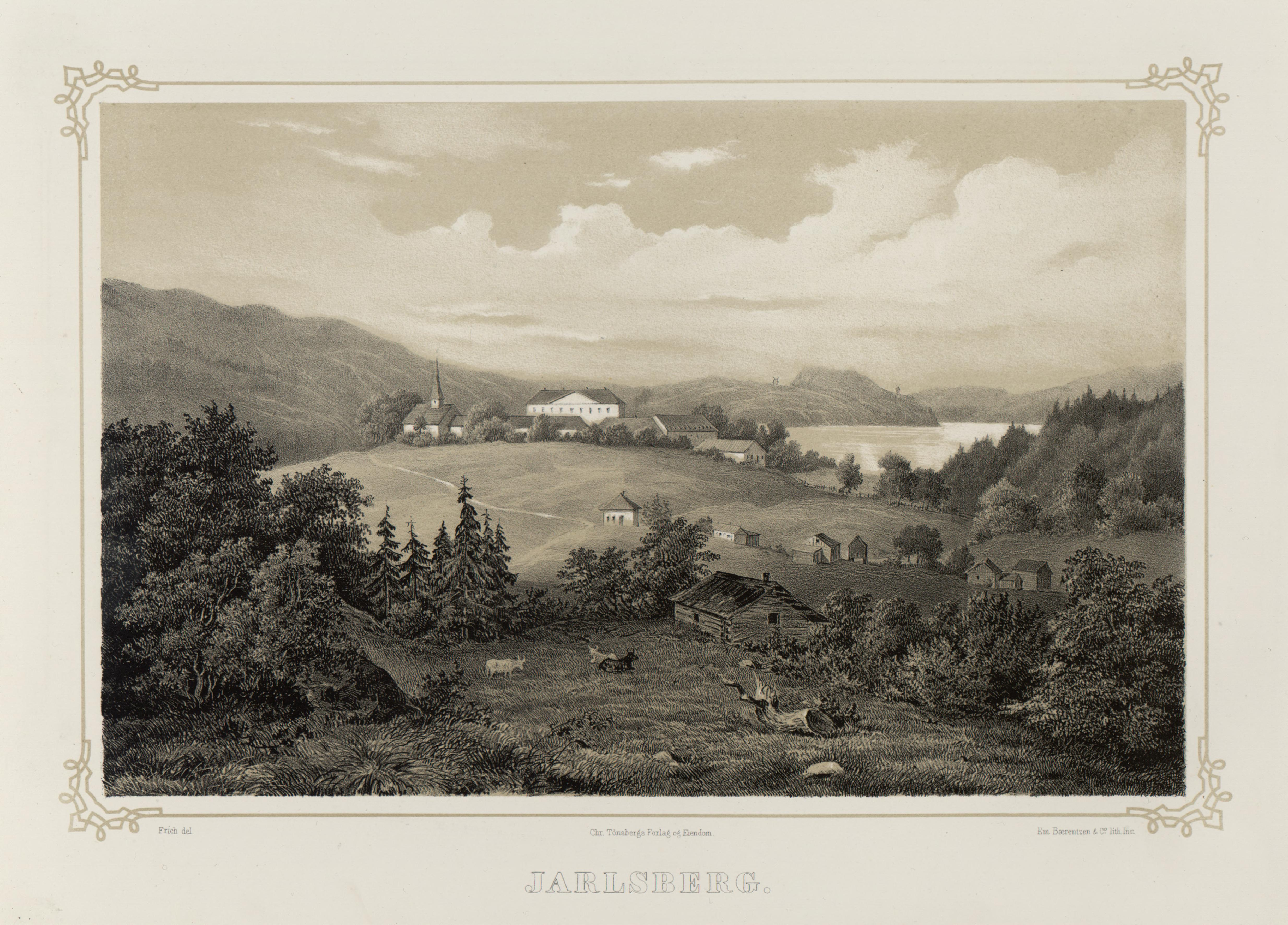 Joachim Frich: Jarlsberg. Illustrasjon hentet fra boken "Norge fremstillet i Tegninger" av Asbjørnsen, P.Chr. og utgitt av Chr. Tønsberg (no, 1848)